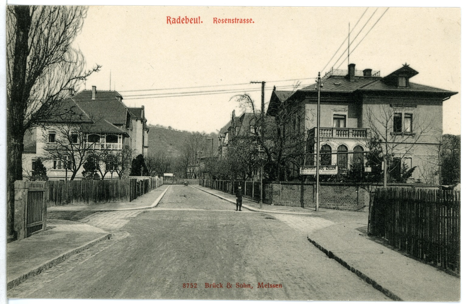 Radebeul; Rosenstraße This postcard is from publisher Brück & Sohn in Meißen ( postcard has a unique number 08752 and is available in a higher resolution at the publisher. This images was uploaded in a cooperation project between Wikipedians and the publisher.